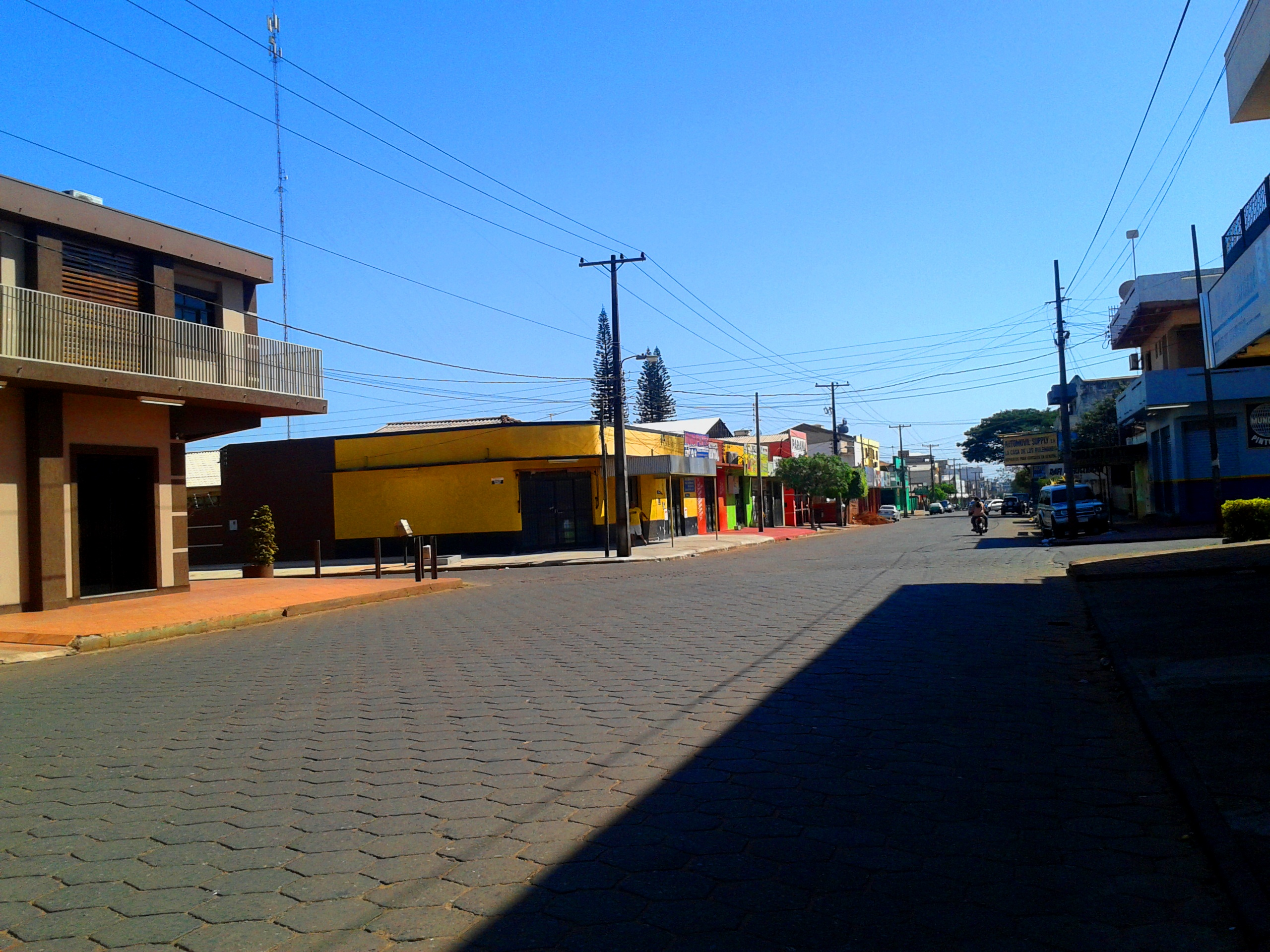 Algunas calles del Centro aun mantienen sus calles adoquinadas.